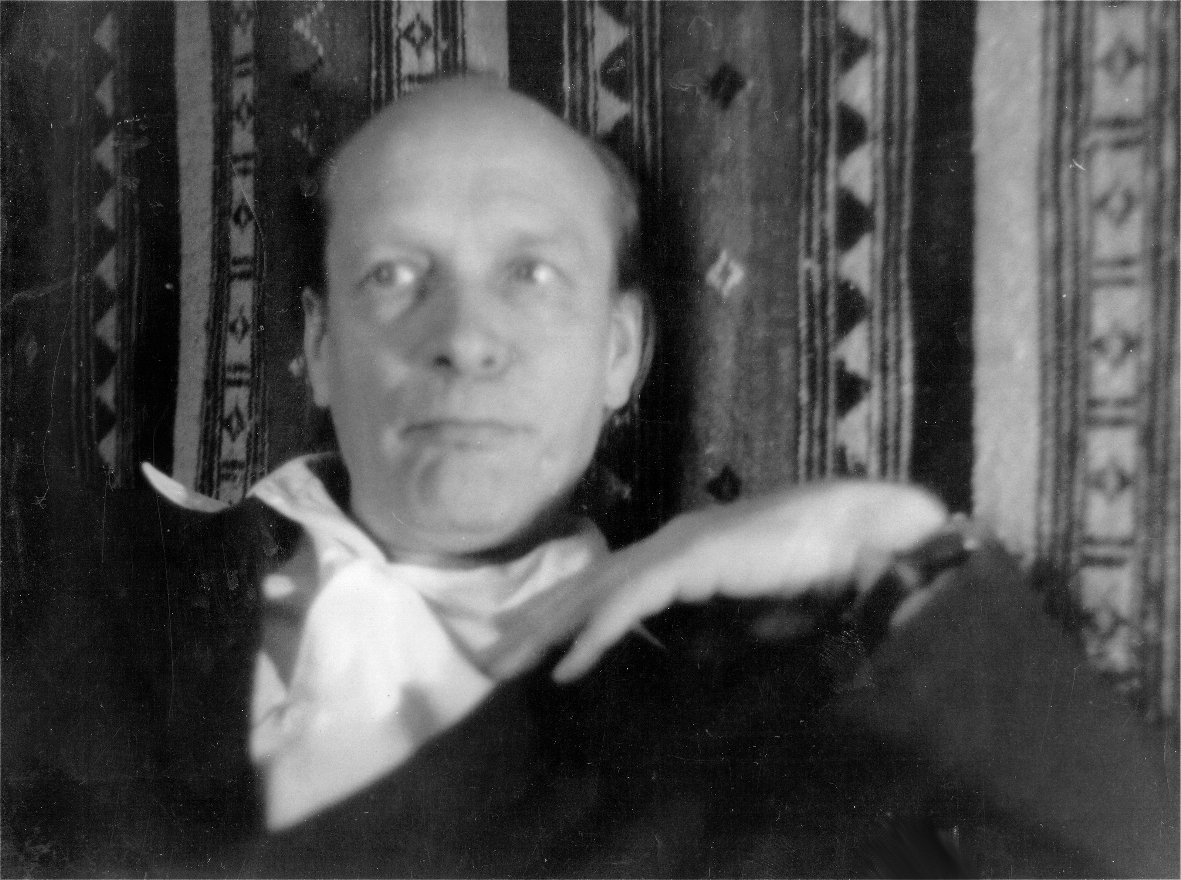 копия фотопортрета Л. А. Шульца, 1964